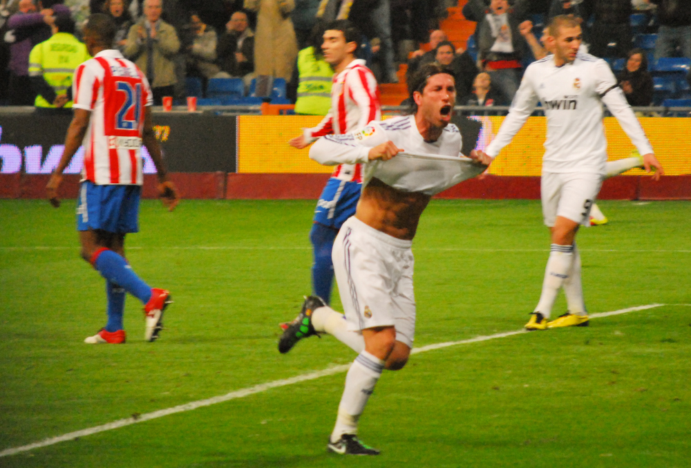 Copa del rey 13 de enero de 2011 Real Madrid 3 - Atletico 1